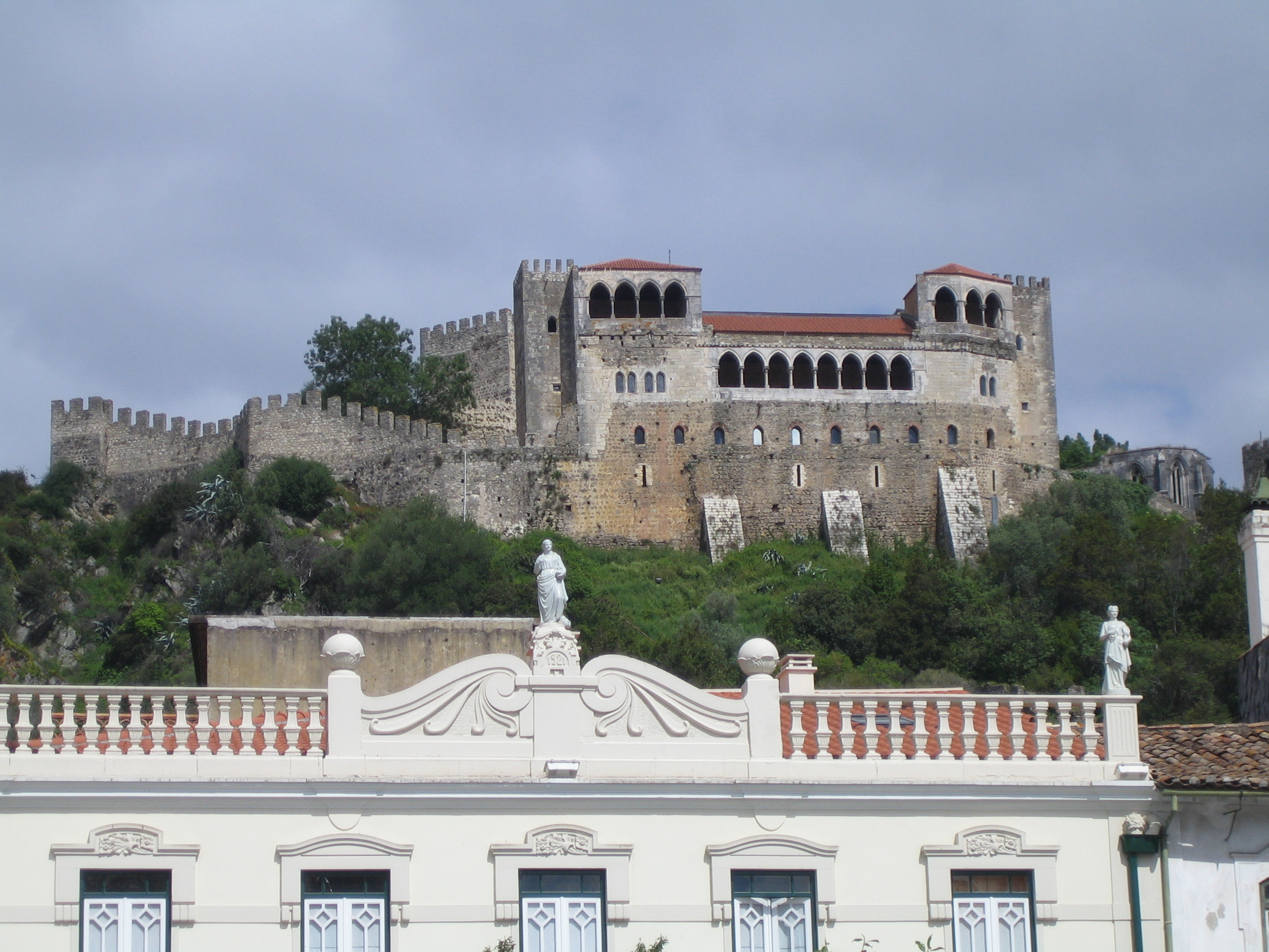 Photo prise par Utilisateur:Leiria à Leiria.